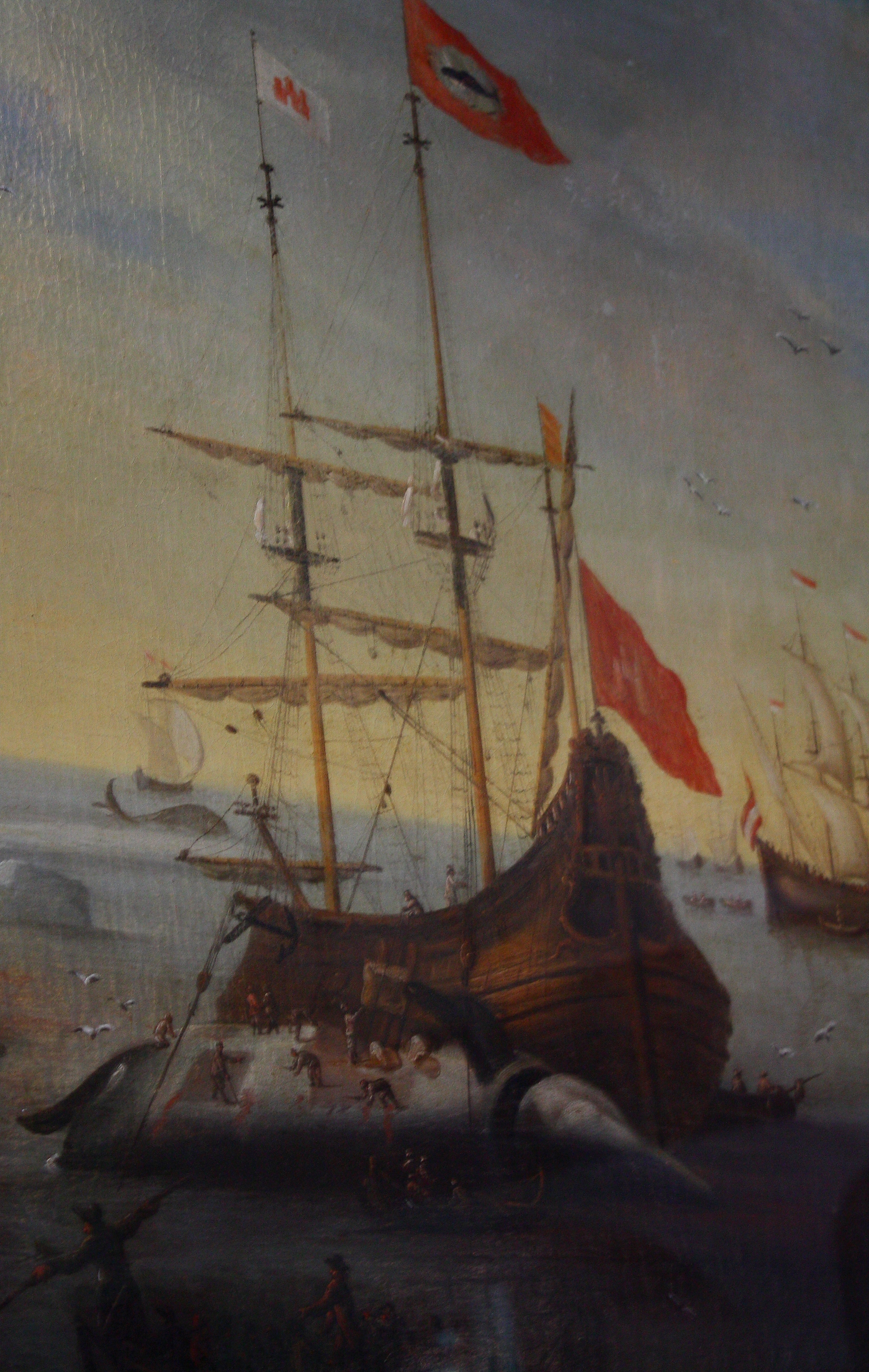 Hamburger Walfänger DIE SONNE, Ausschnitt von Ölgemälde von F.W. Stuhr um 1680